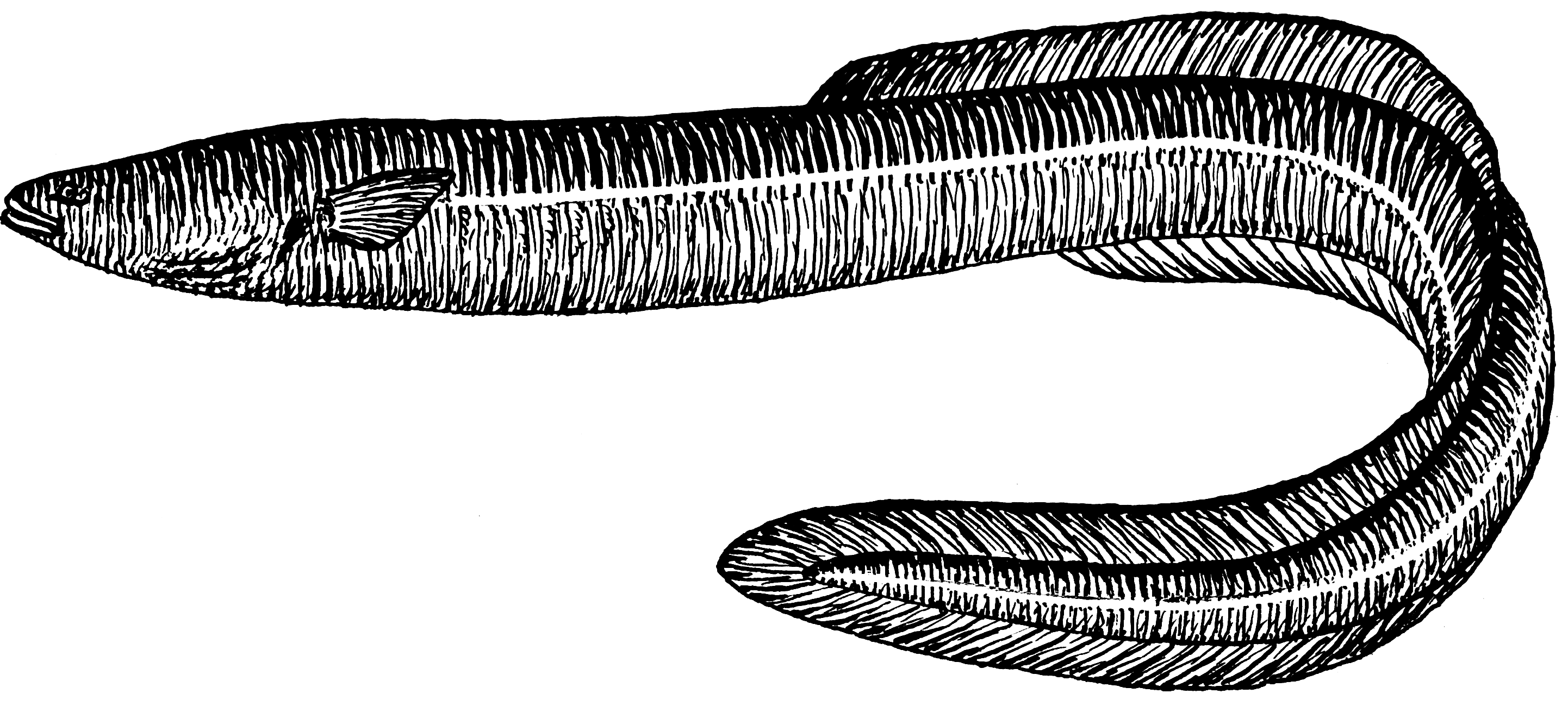 Eel